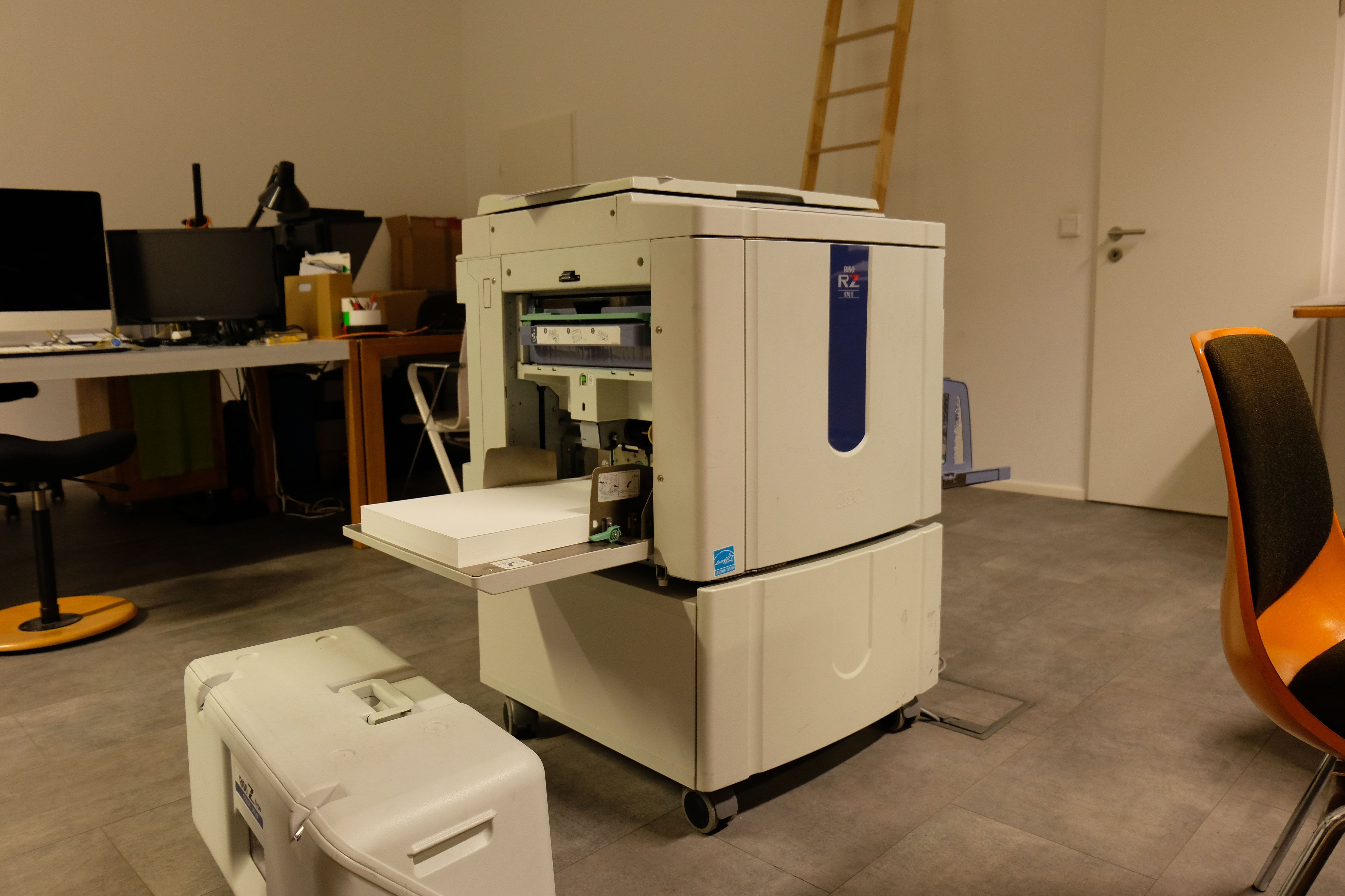 Riso RZ 970 im Atelier von Herr und Frau Rio in München (2020)